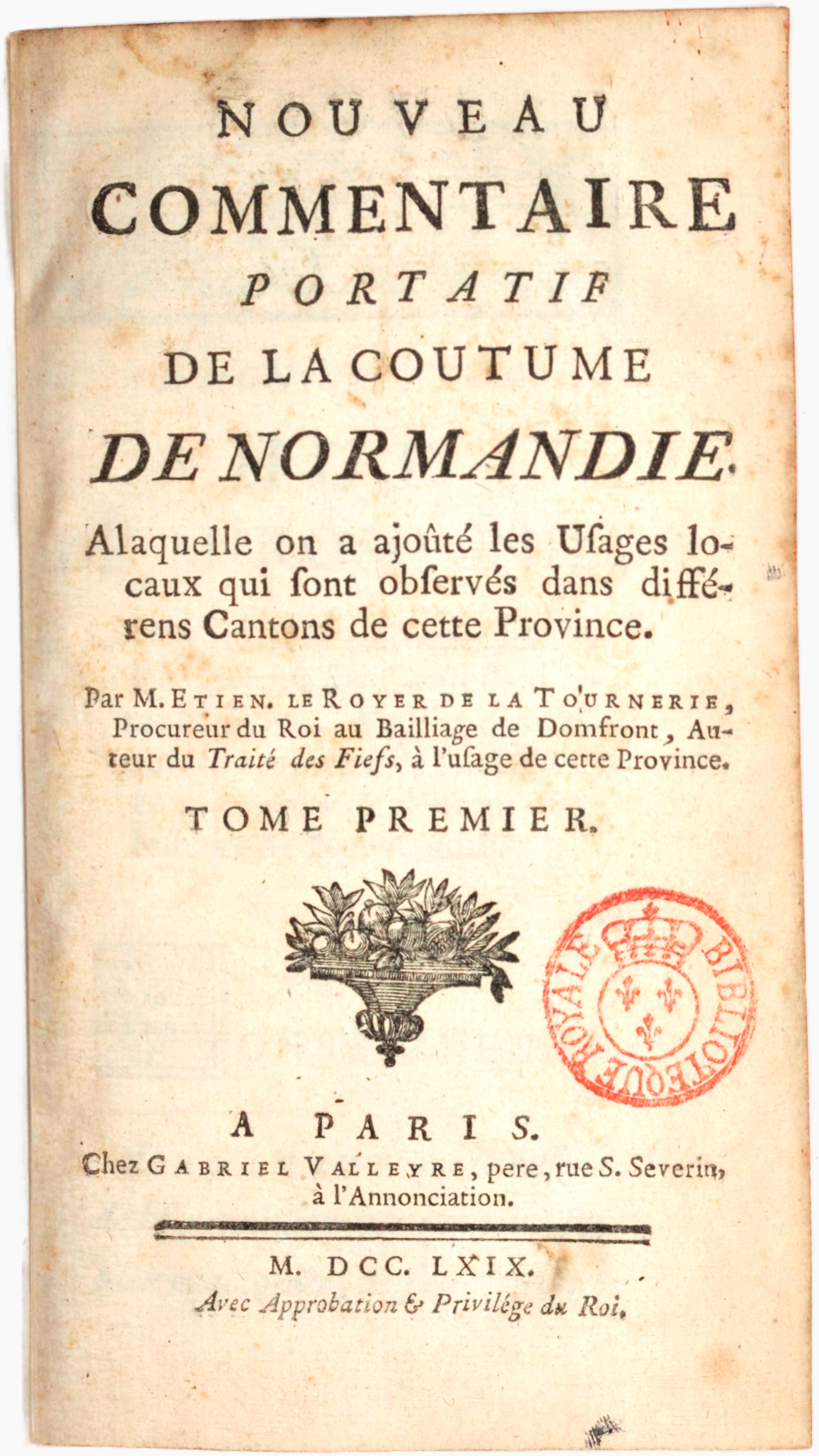 Frontispiece of Étienne Le Royer de La Tournelle's Nouveau Commentaire portatif de la Coutume de Normandie""